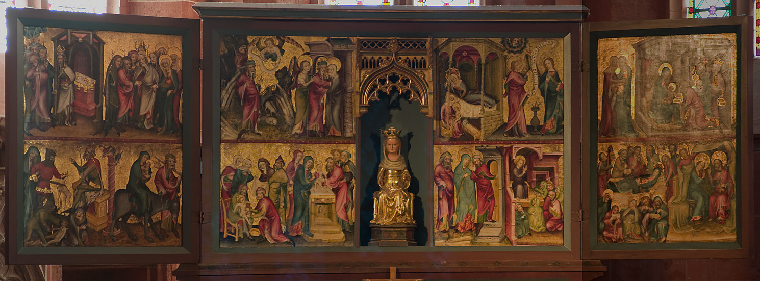 Flügelaltar (Hochaltar) in der Liebfrauenkirche in Schotten im Vogelsbergkreis. Der Altar zählt zu den Hauptwerken der spätgotischen Malerei.